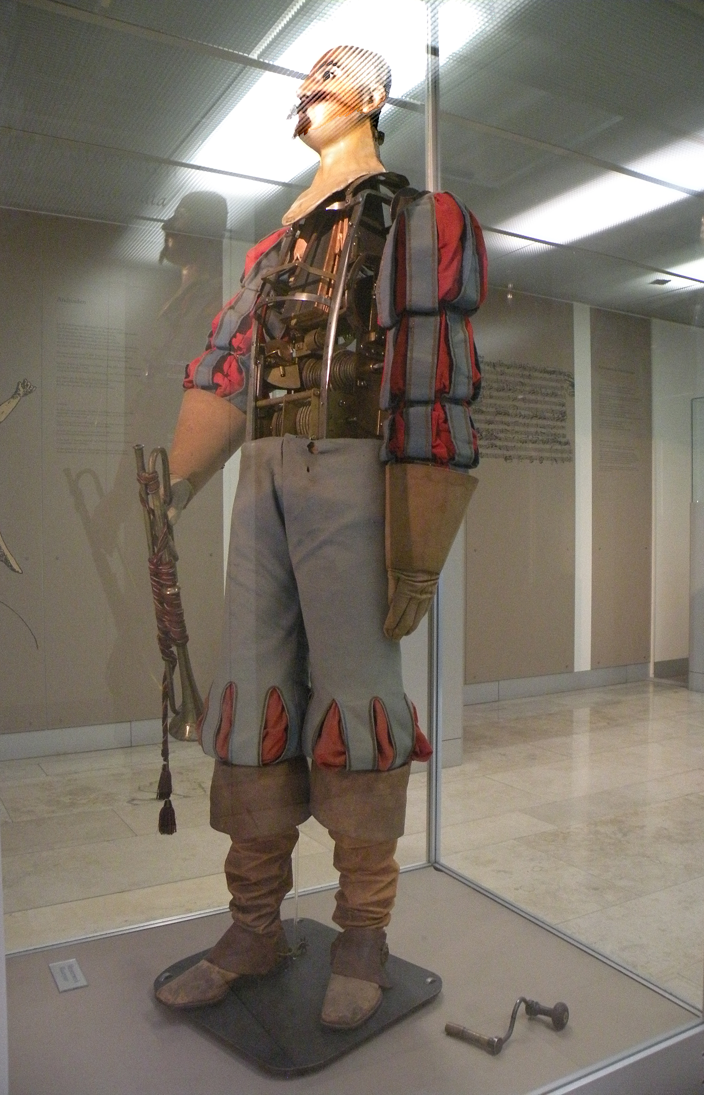 Андорид